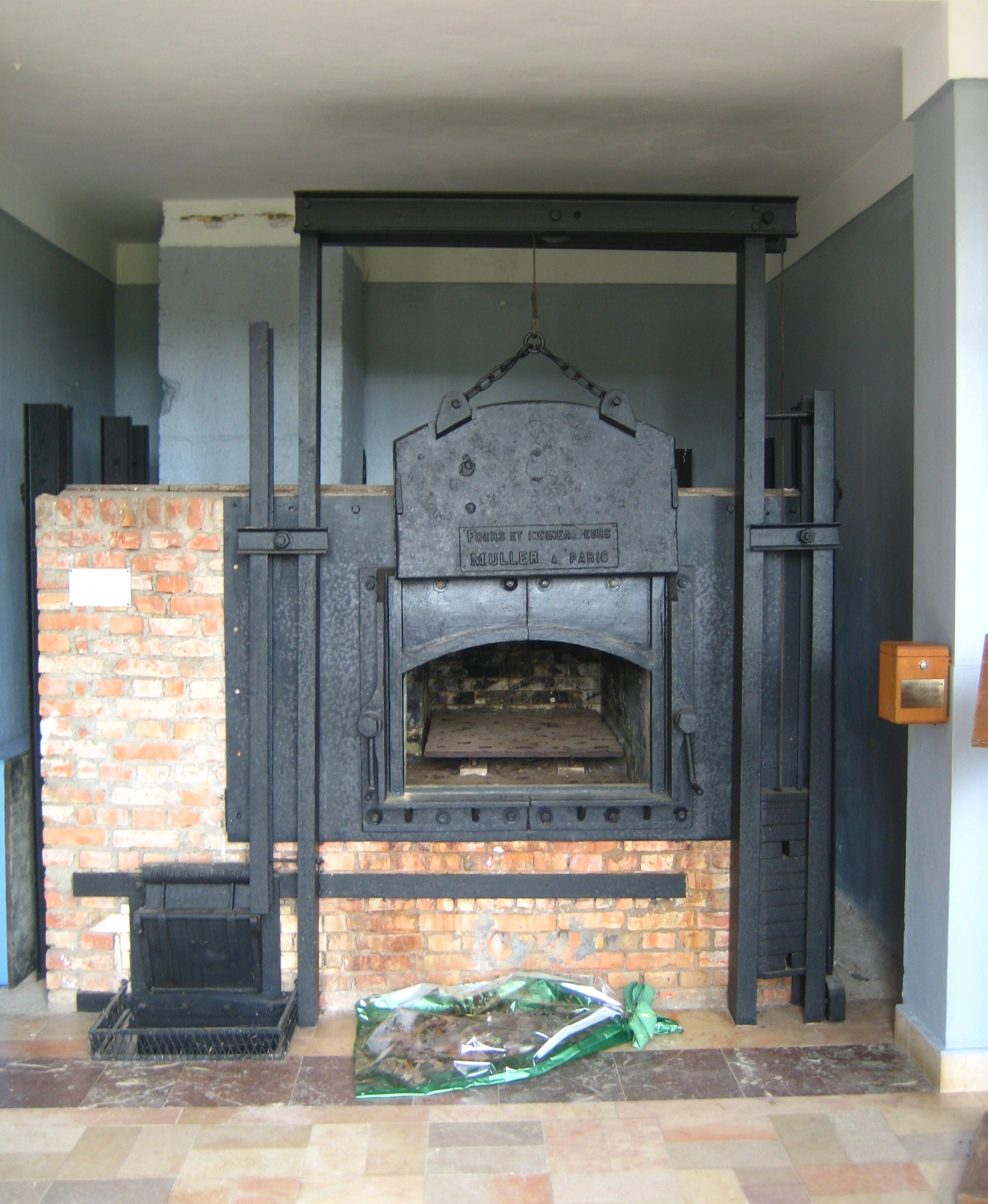 Description Four crématoire du Camp de Thil Date26 June 2009Sourcemon appareil photoAuthorAimelaime Four crématoire du Camp de Thil